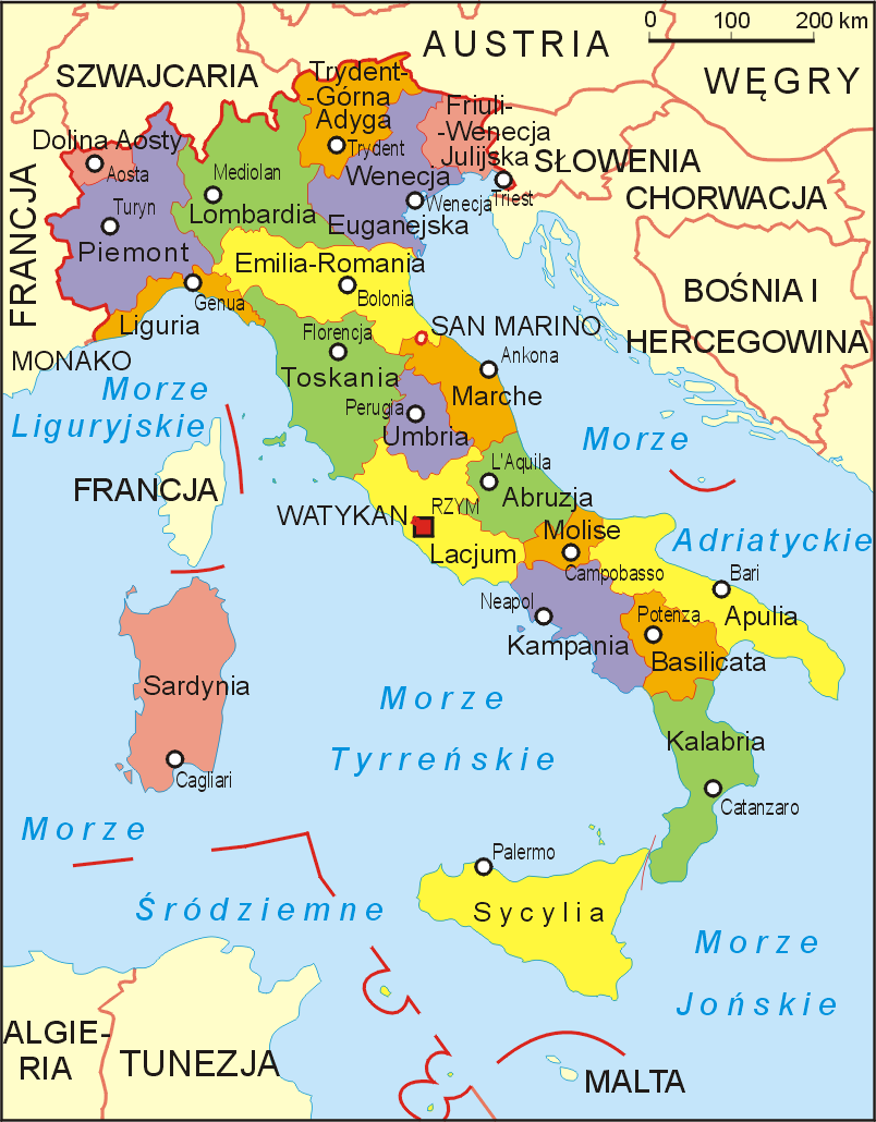 Mapa administracyjna Włoch. Autor Aotearoa